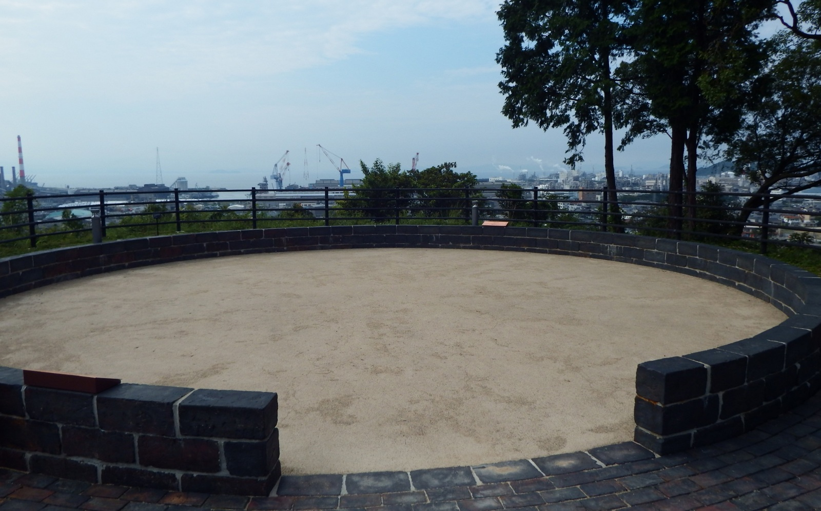 日暮別邸記念館の展望台